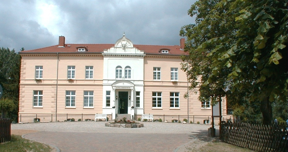 Fotografie von Schloss Daschow in Gallin-Kuppentin, Mecklenburg